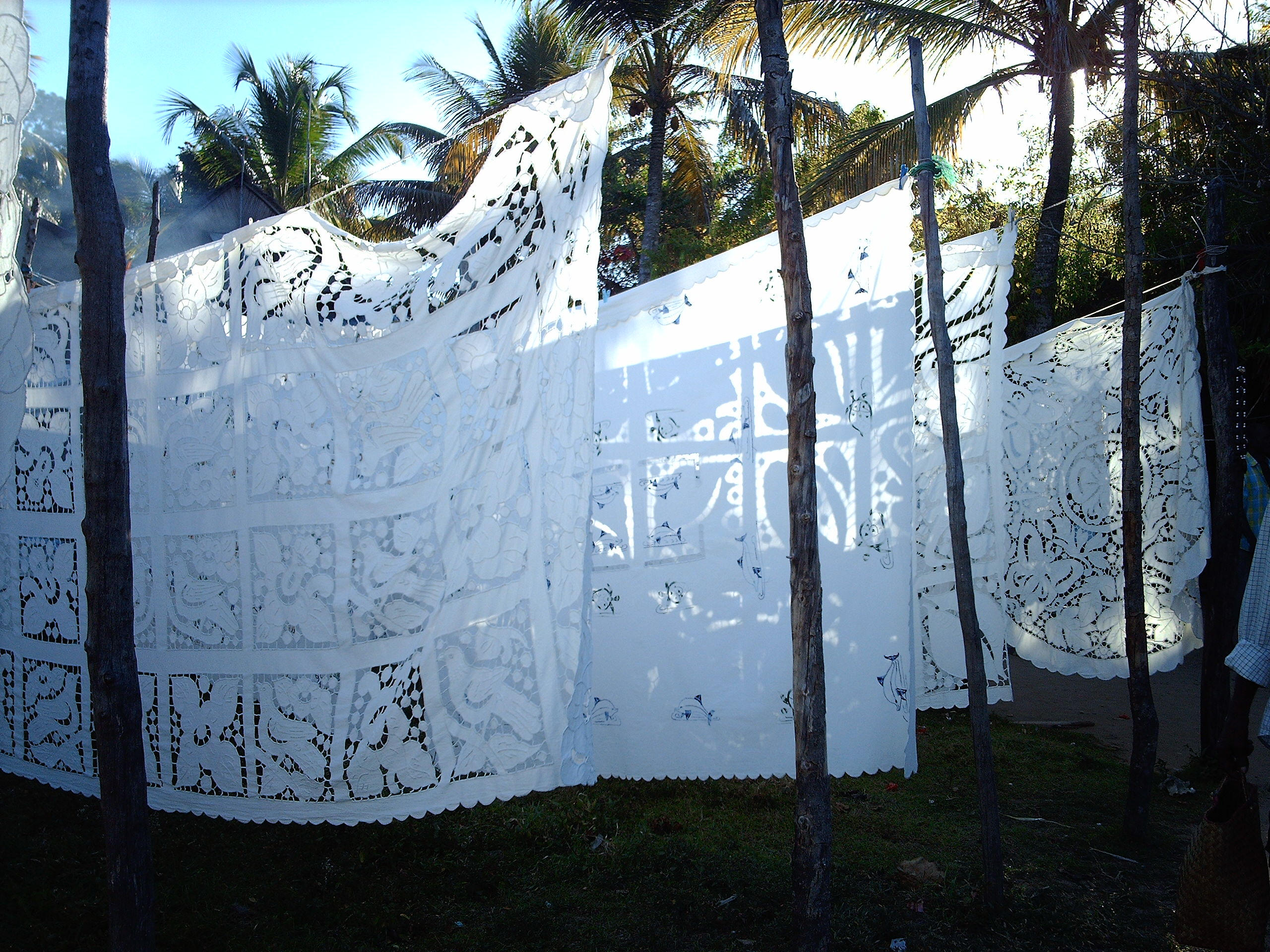 Nappes vendues à Nosy Komba, madagascar, réalisées en point Richelieu